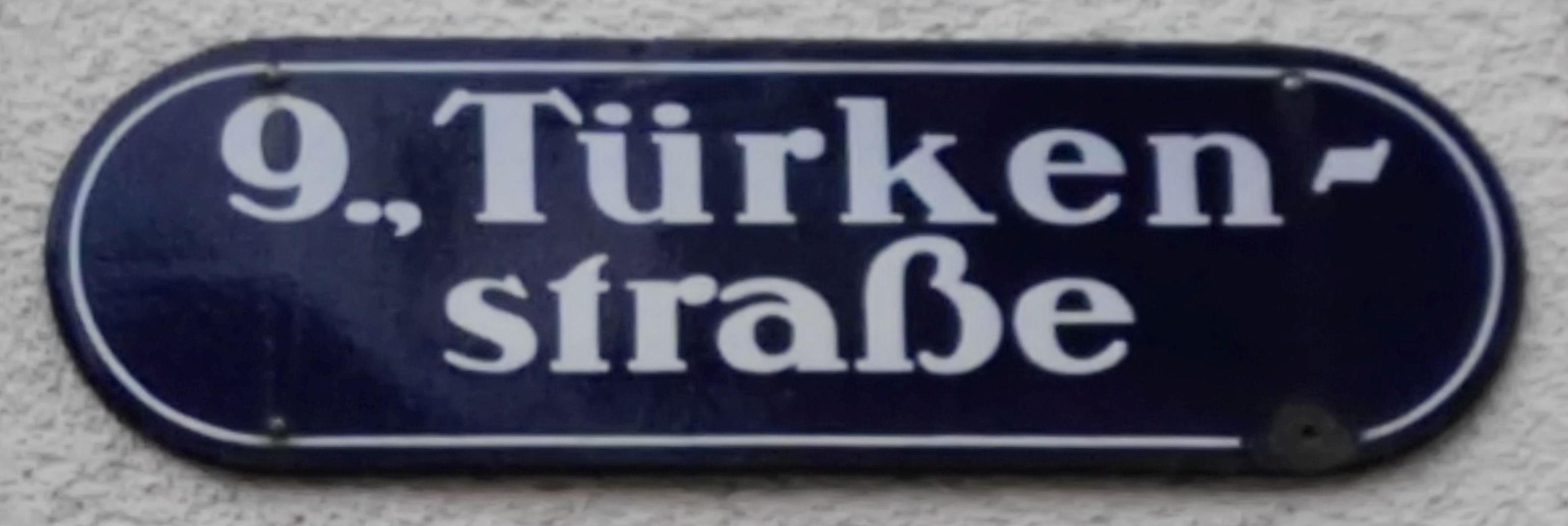 Straßenbenennungstafel Wien-Alsergrund Türkenstraße